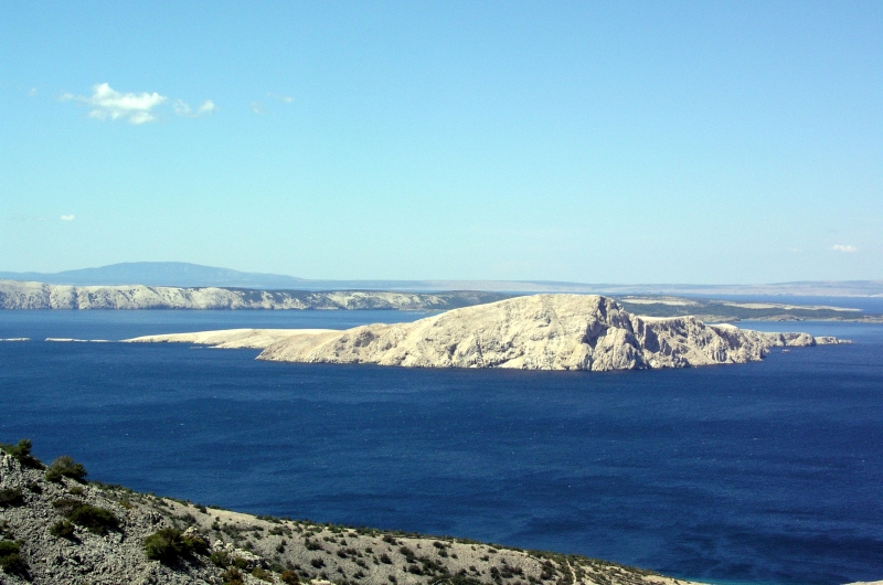 Goli otok, Croatia